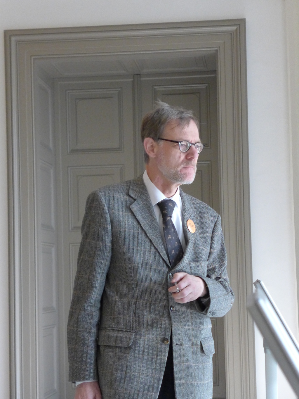 Direktor Luckhardt zählt Besucher im Eingangsbereich seines Museums in der Woche der Wiedereröffnung nach dem Umbau.